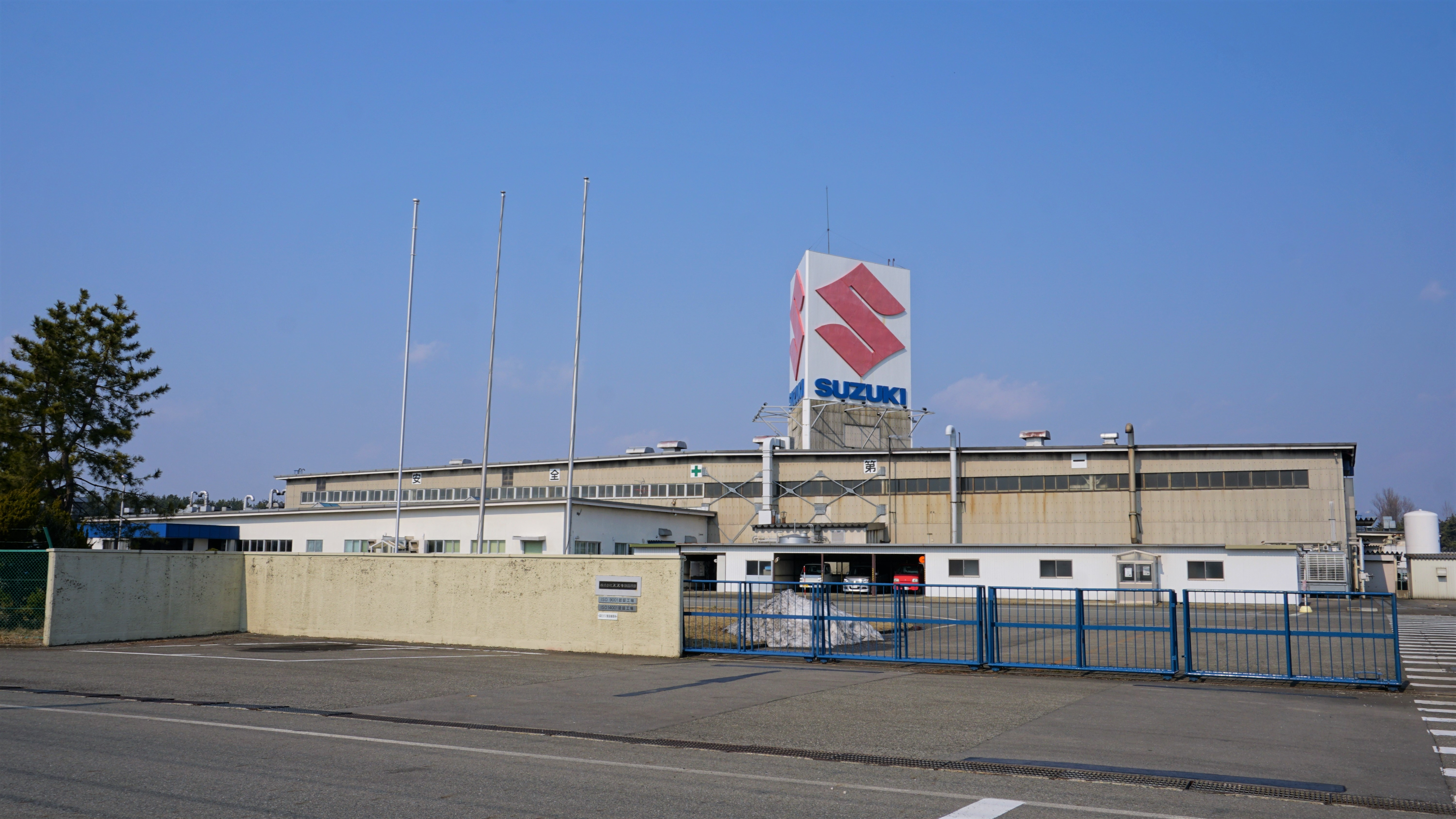 スズキ部品秋田（秋田県南秋田郡井川町）